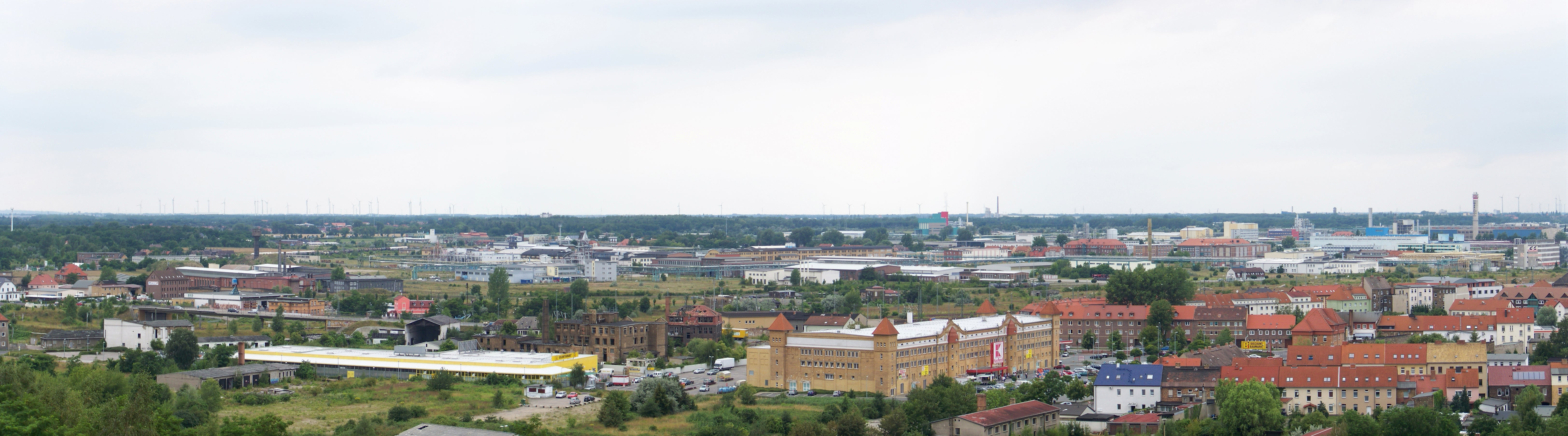 Teil des Chemieparkes Bitterfeld-Wolfen, unten rechts beginnt die Stadt Bitterfeld